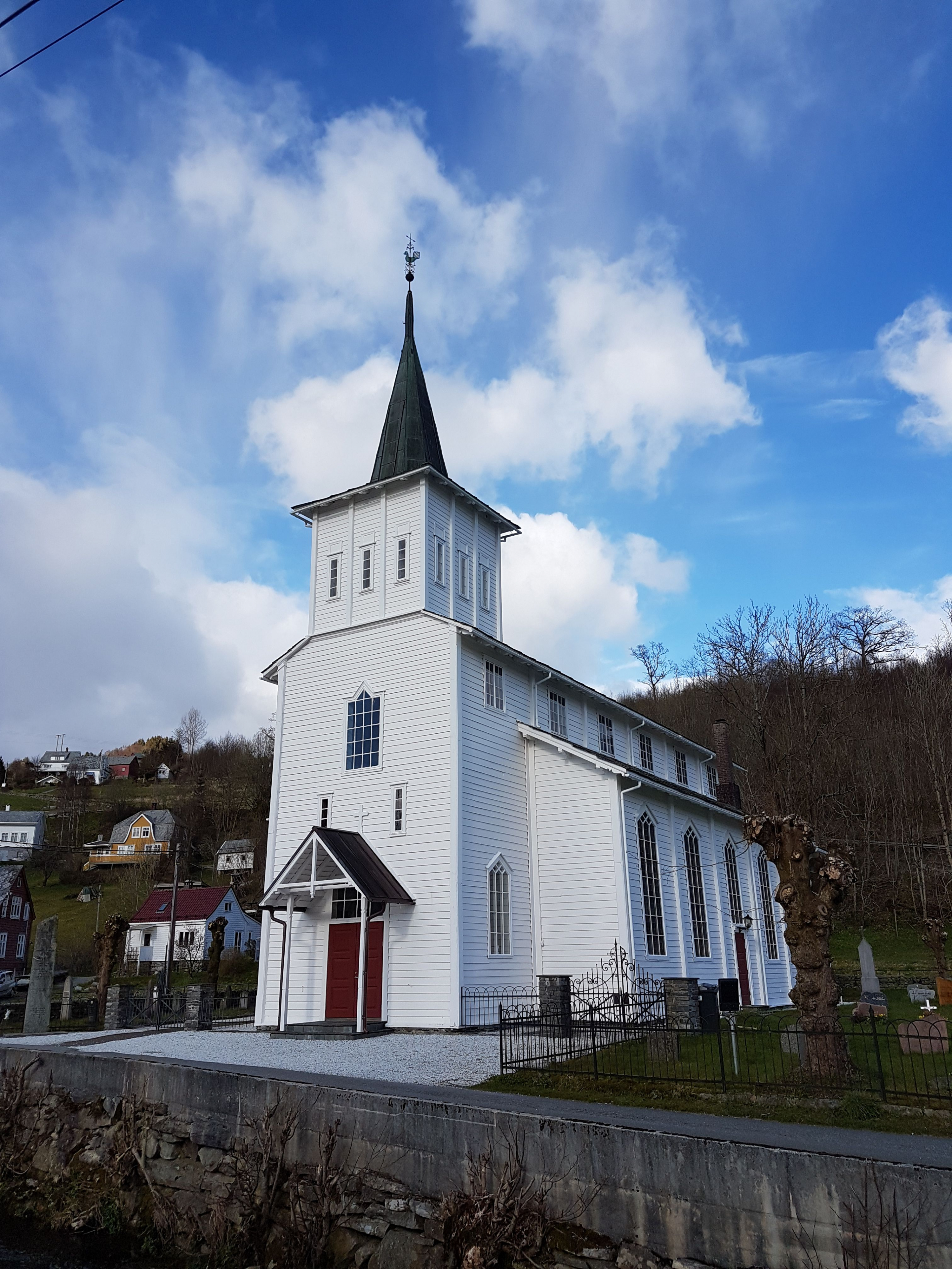 Strandvik kirke. Foto: Roger Grimelid. Fra Riksantikvarens Kulturminnesøk.